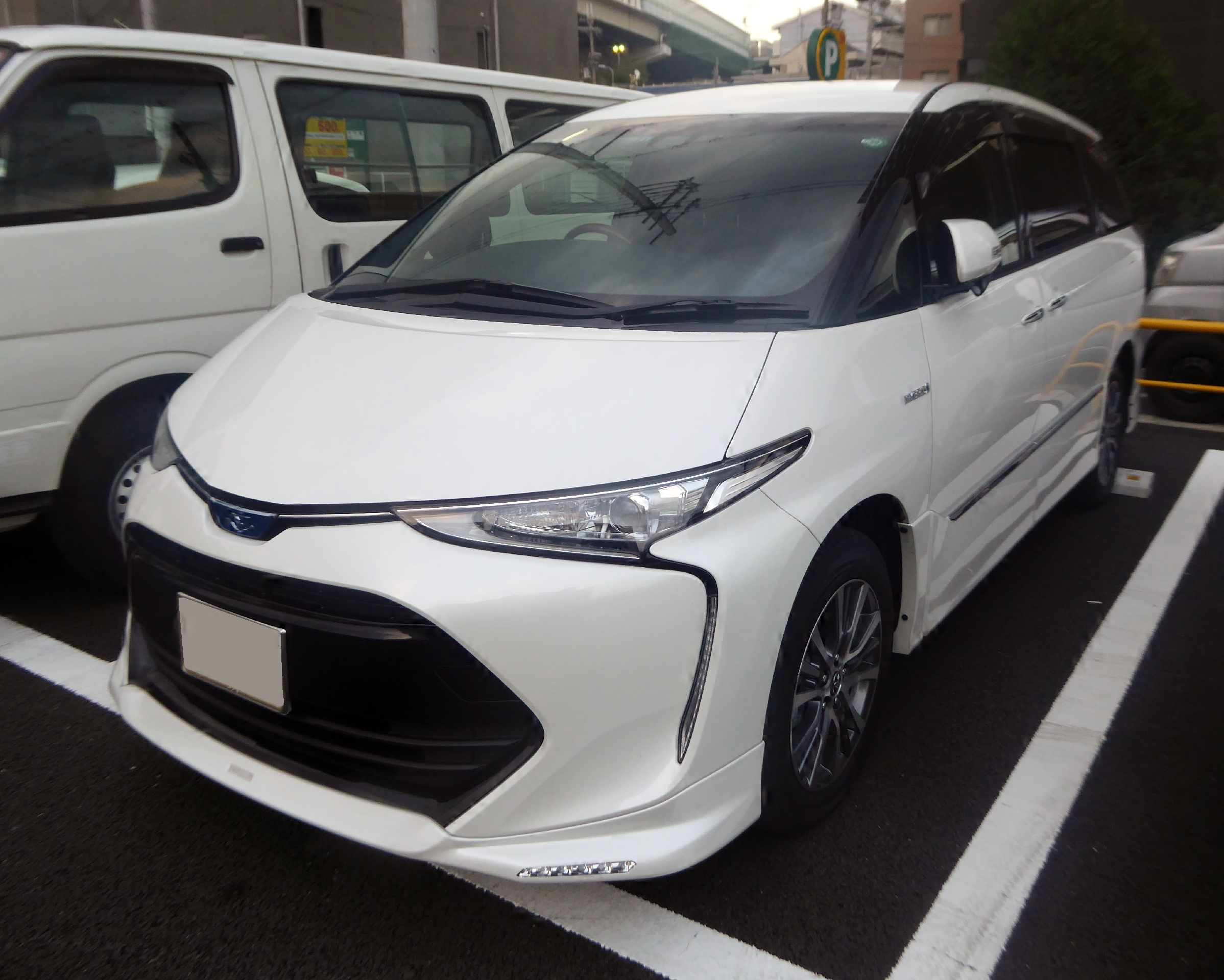 DAA-AHR20W-GFXZB型トヨタ・エスティマハイブリッドAERAS PREMIUM-Gをフロントから撮影。